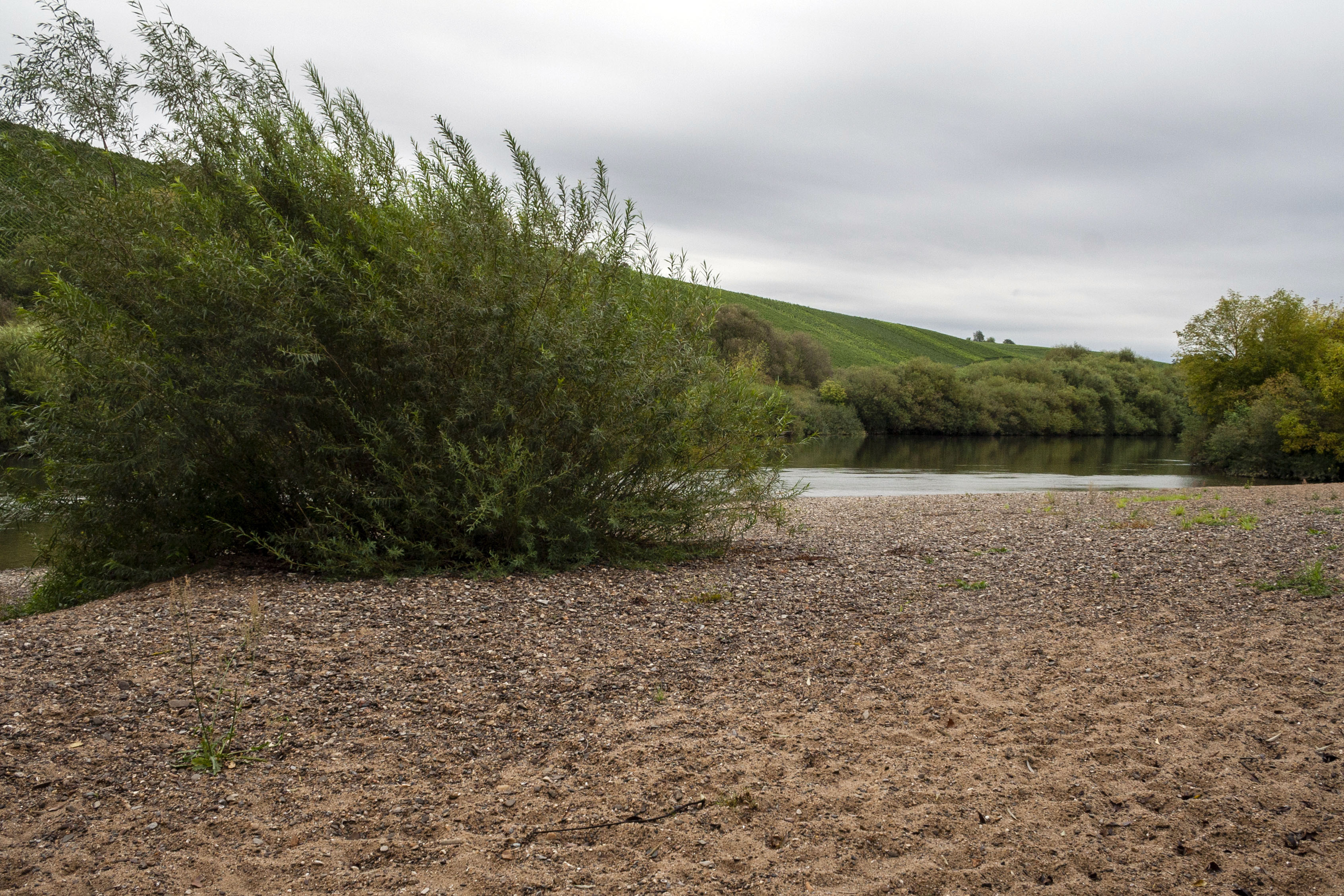 Naturschutzgebiet, Main, Nordheim